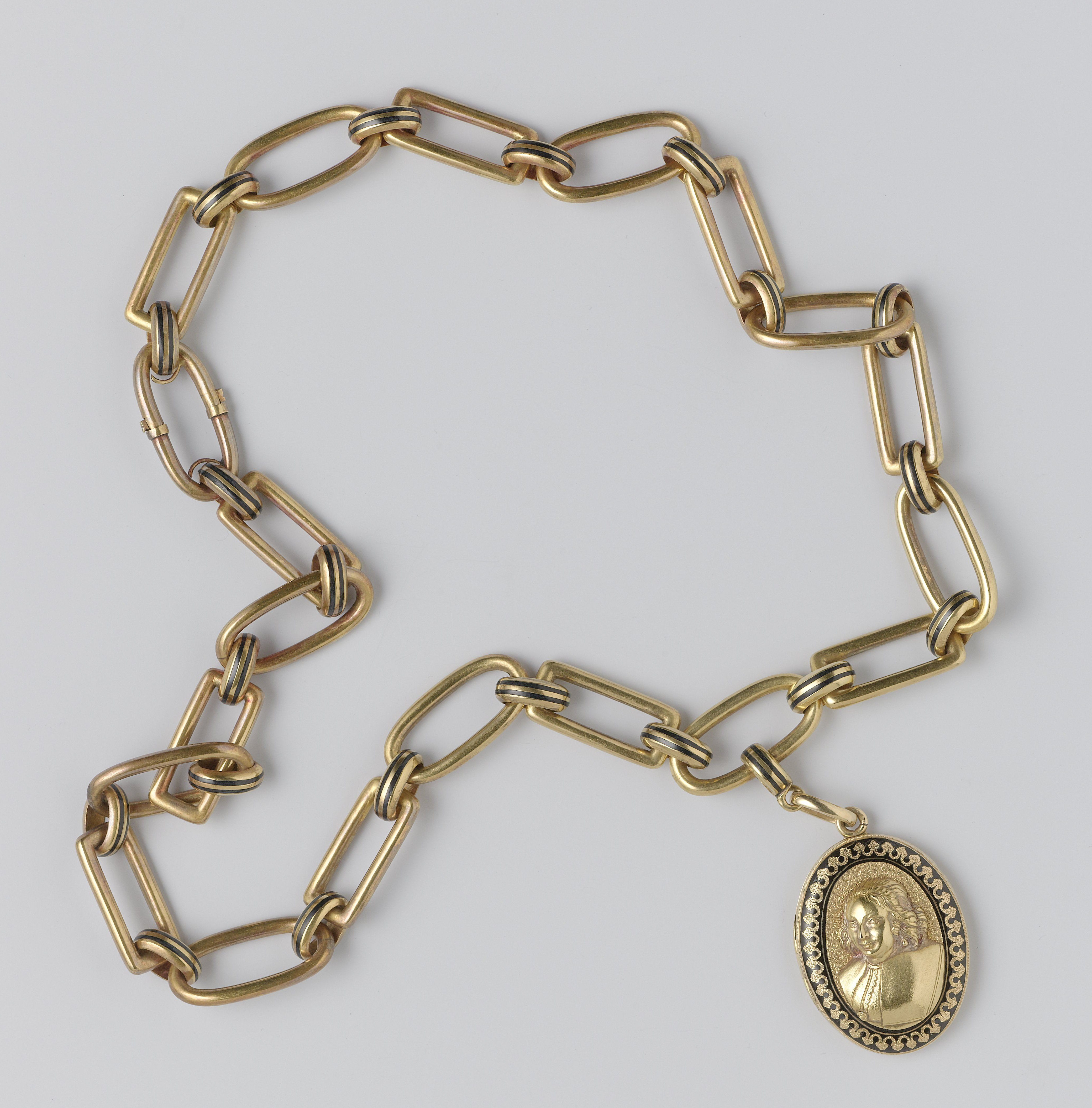 Collier, onderdeel van de Potgieter-parure (ca. 1855)